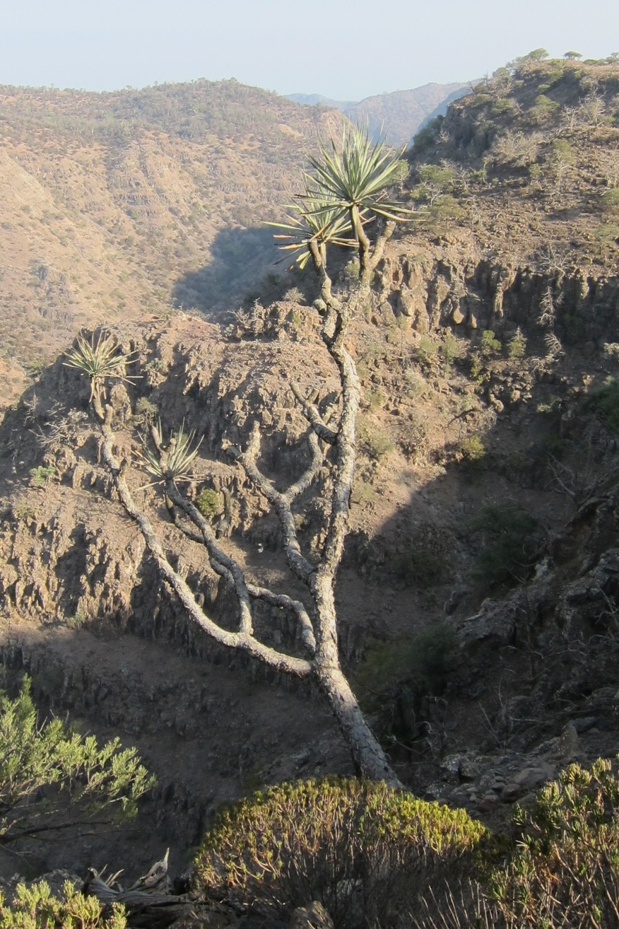 Dracaena ombet Heuglin ex Kotschy & Peyr. en bordure de la Forêt du Day, Djibouti